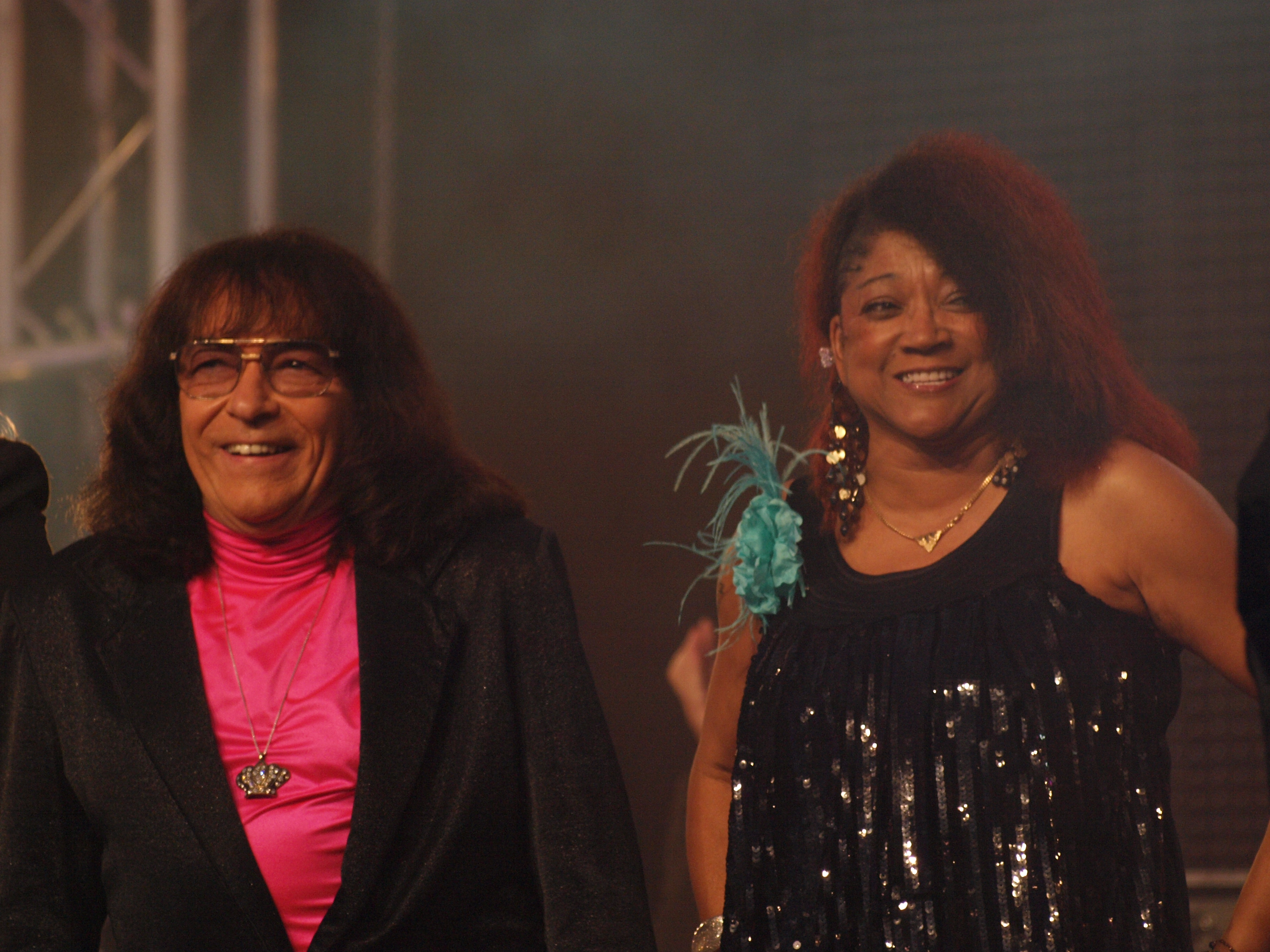 Svenne & Lotta at Stockholm Pride 2010.